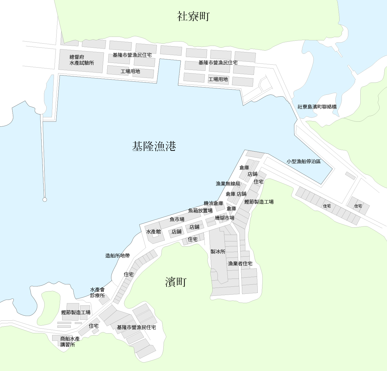 基隆漁港周邊設施，出自《臺北州の水產》